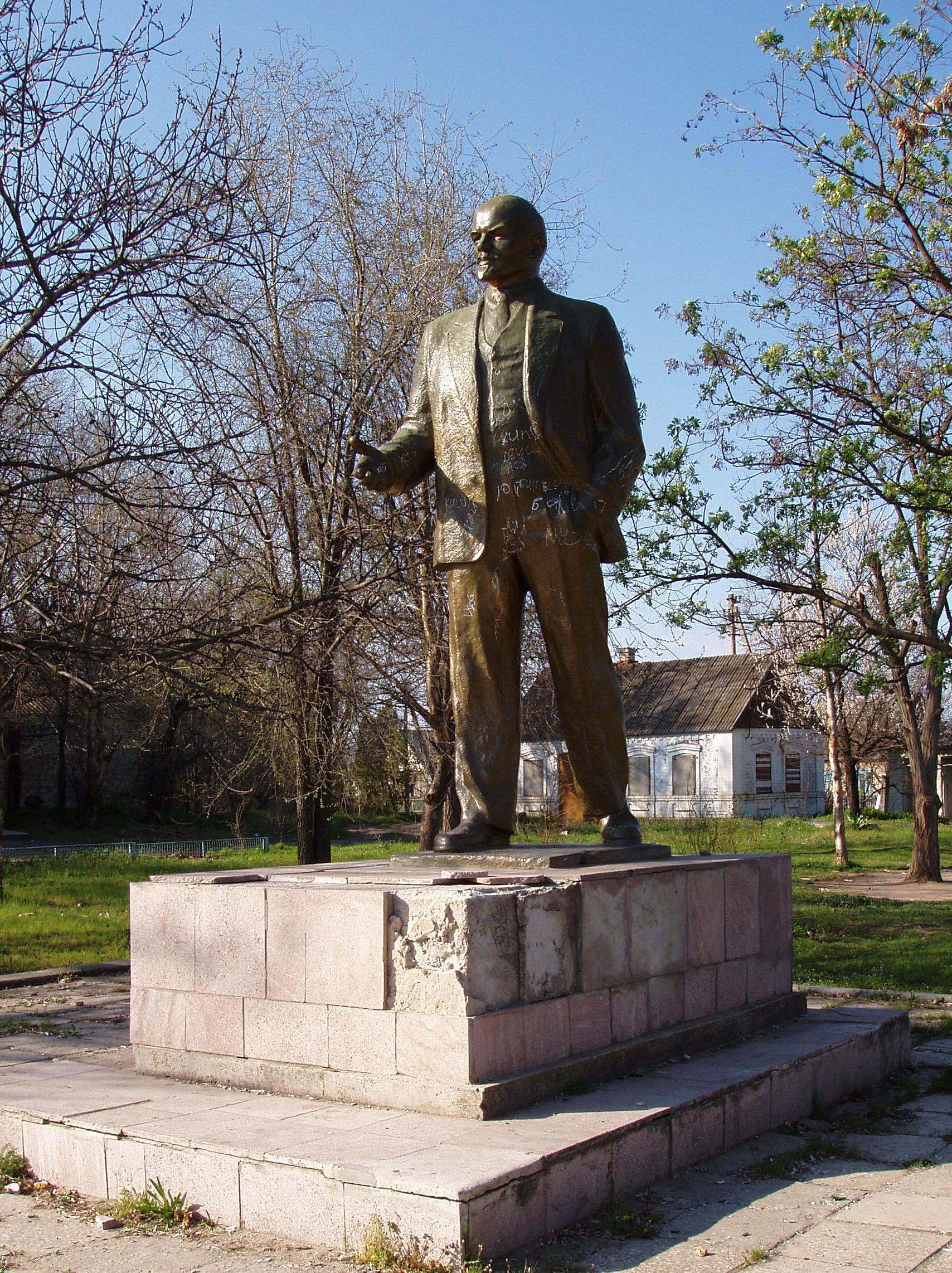 Памятник Ленину в селе Семёновка Мелитопольского района